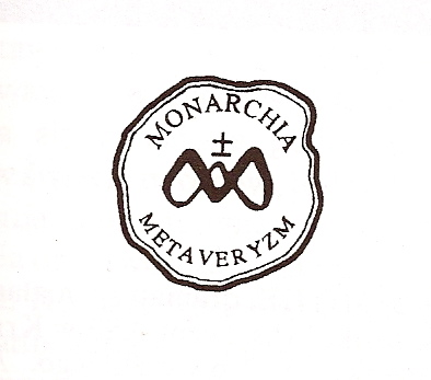 Logo to po raz pierwszy zostało opublikowane w książce "Antylogia metaweryzmu" w 1994r.